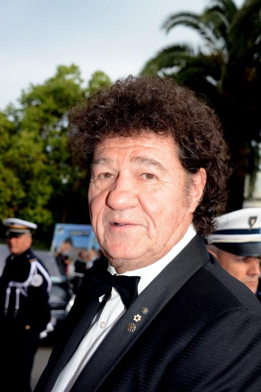 Robert Charlebois au festival de Cannes